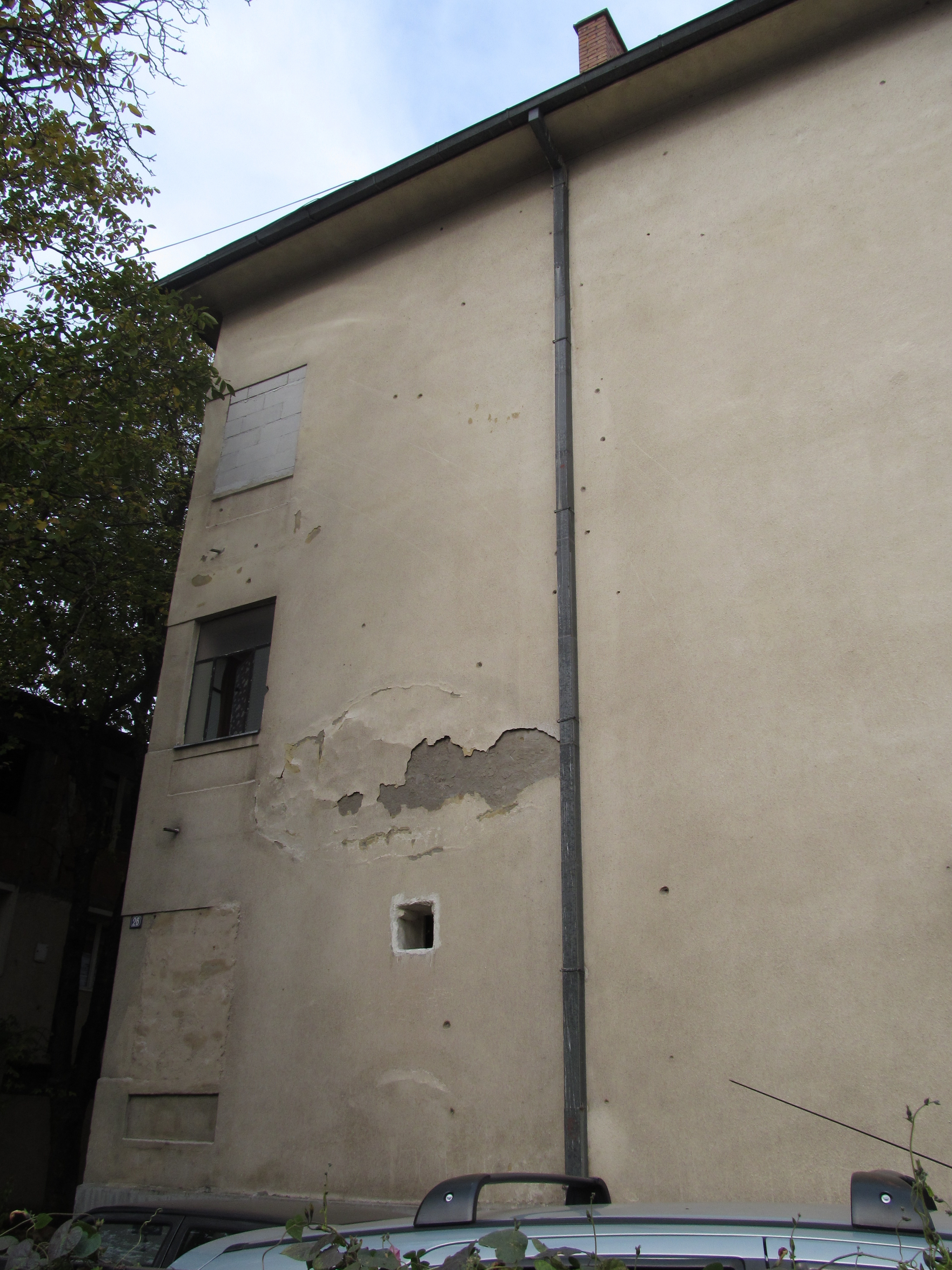 Следы от бомбардировки Ниша кассетными бомбами в 1999 году